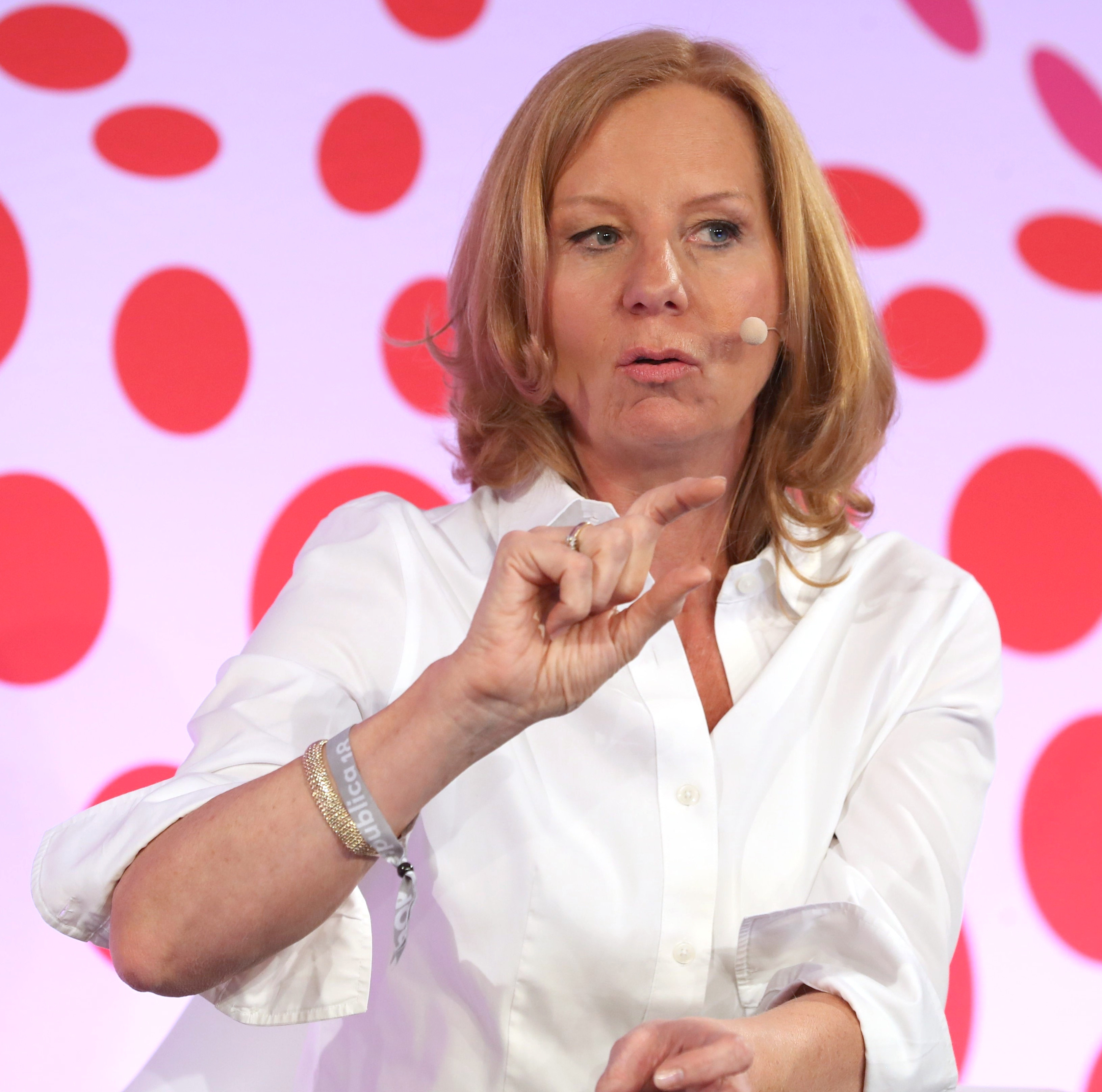 Media Convention Berlin 2018: Patricia Schlesinger (Intendantin, RBB)